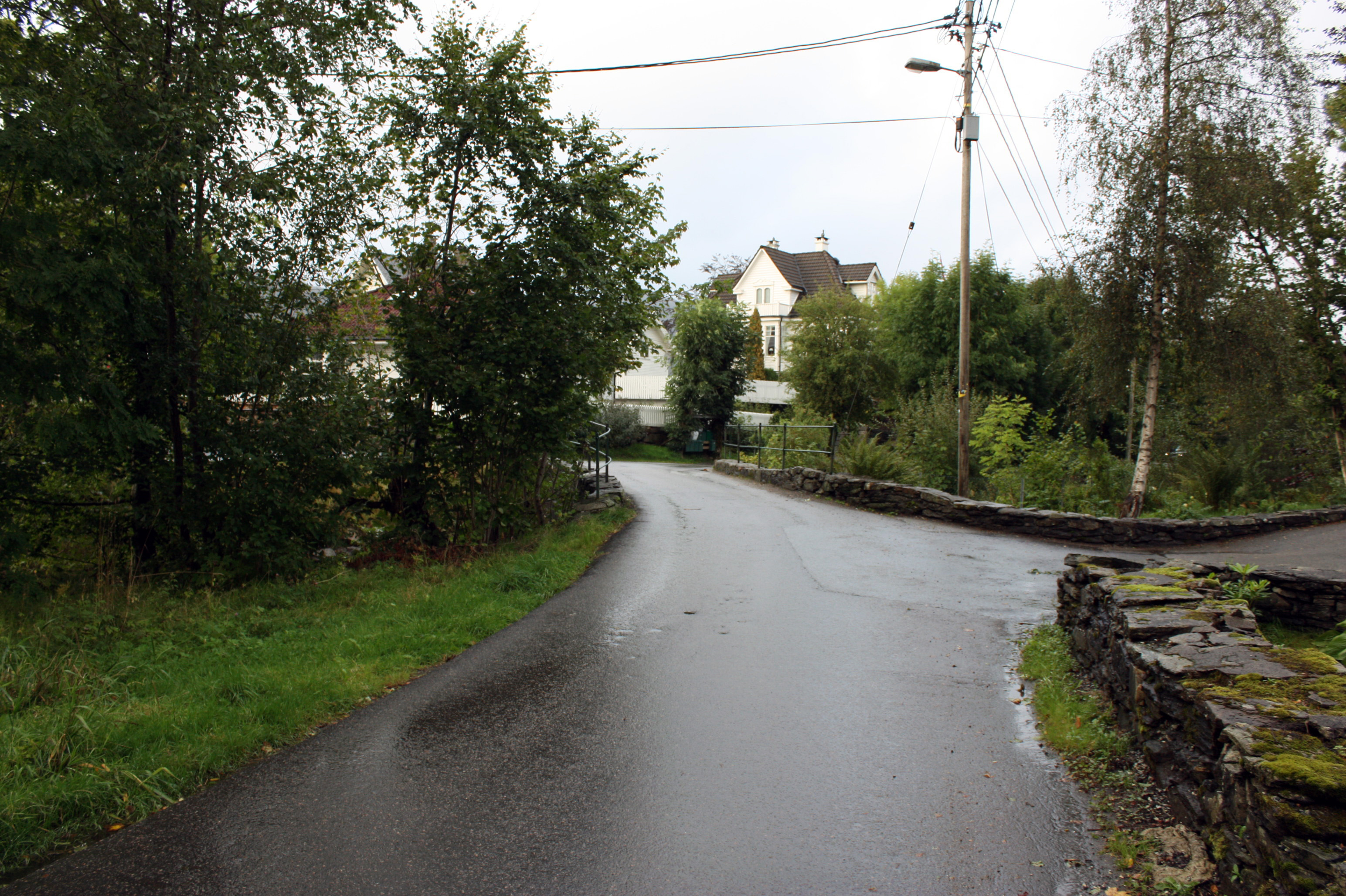 Wernersholmvegen, Bergen.